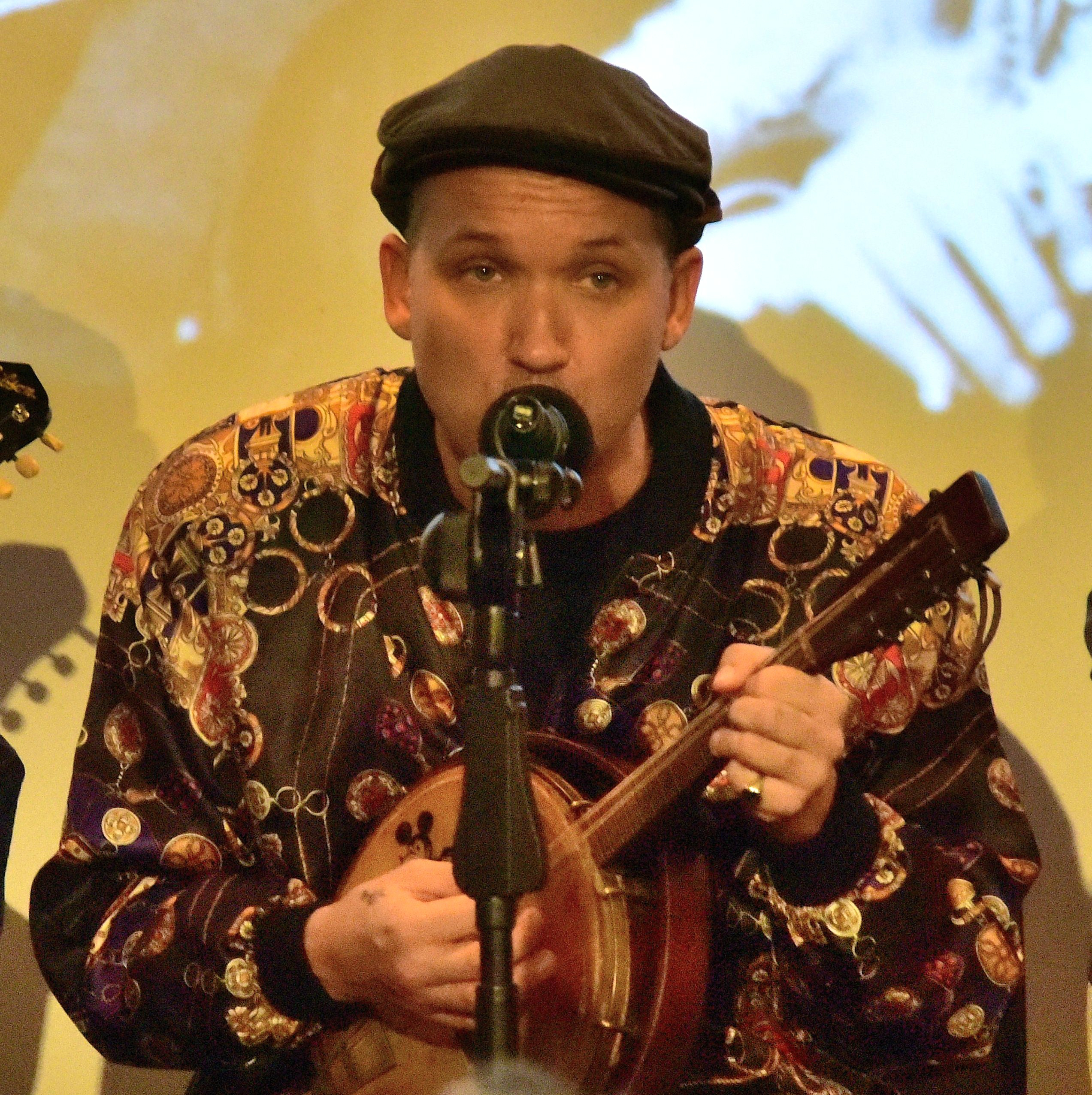 Muzyk Jan Młynarski podczas spotkania „Grzesiuk bez cenzury” w Faktycznym Domu Kultury przy ul. Gałczyńskiego w Warszawie.